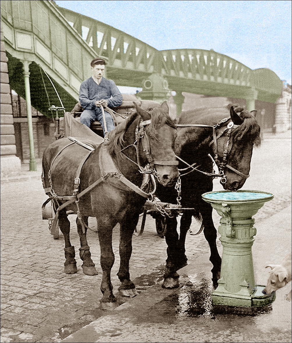 Abreuvoir à chevaux et pour chiens à Paris vers 1900.